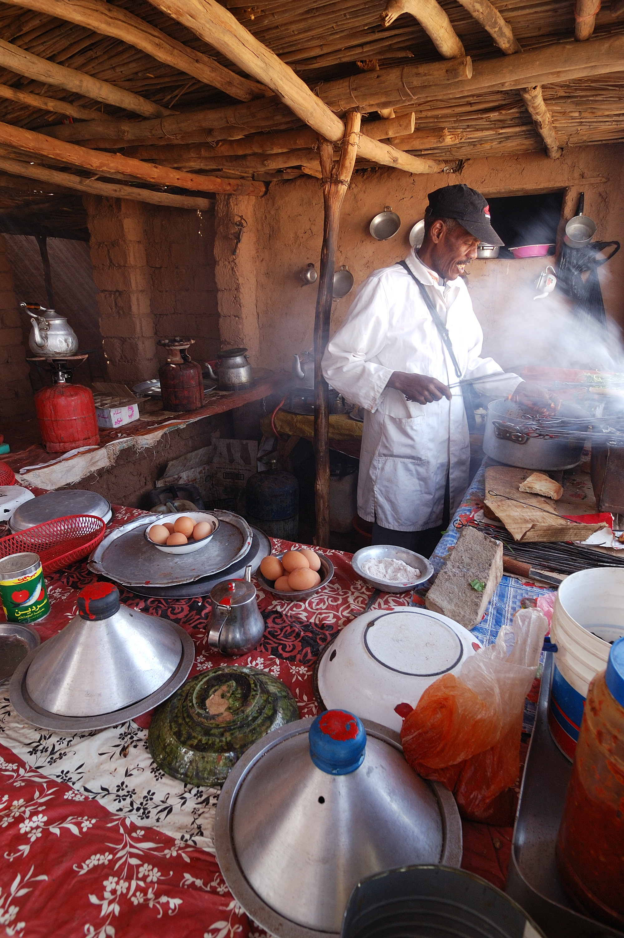 Agdz, Morocco [2009]